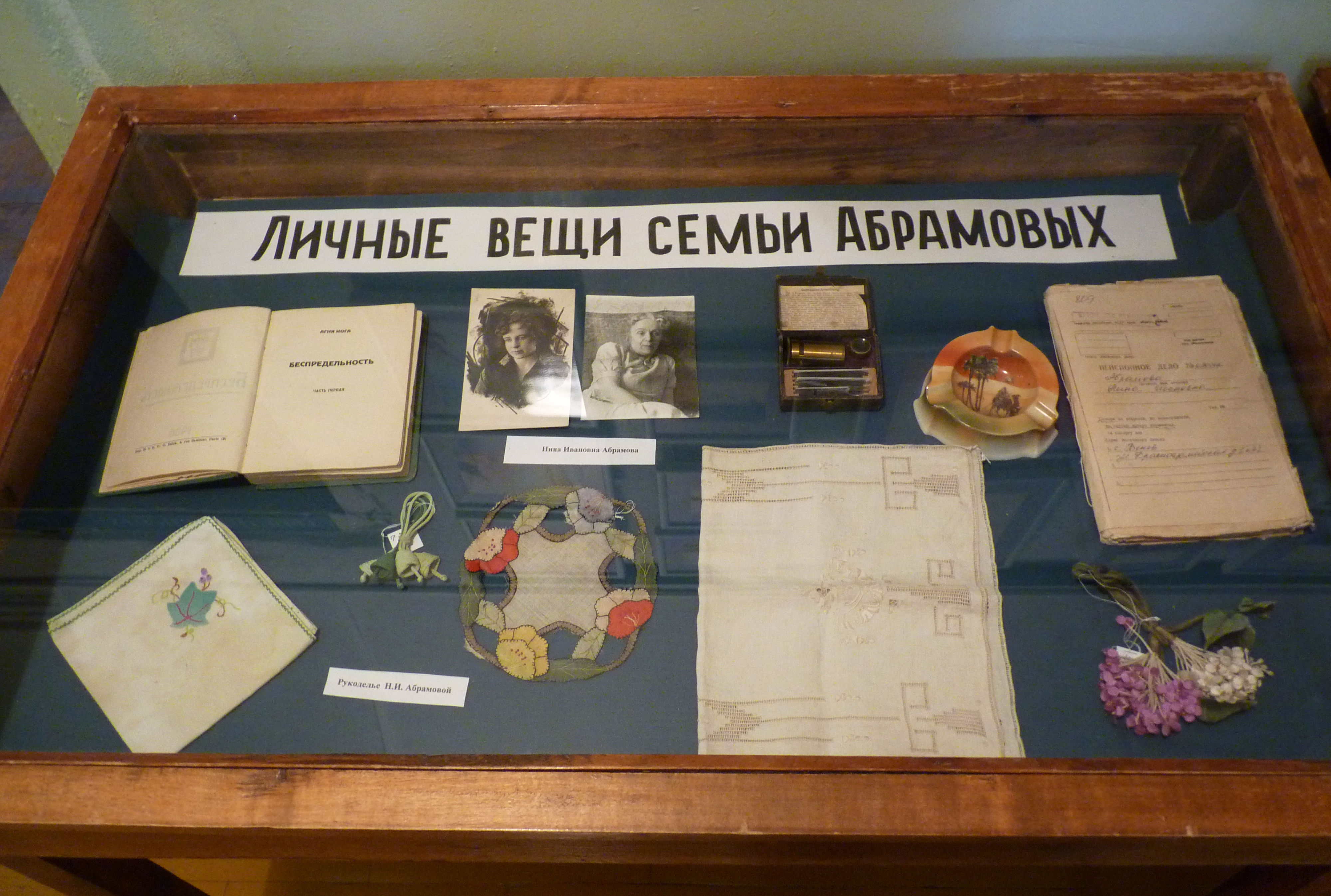 Фото экспозиции, посвященной Б. Н. Абрамову, в Краеведческом музее г. Венёва. 2014 г.